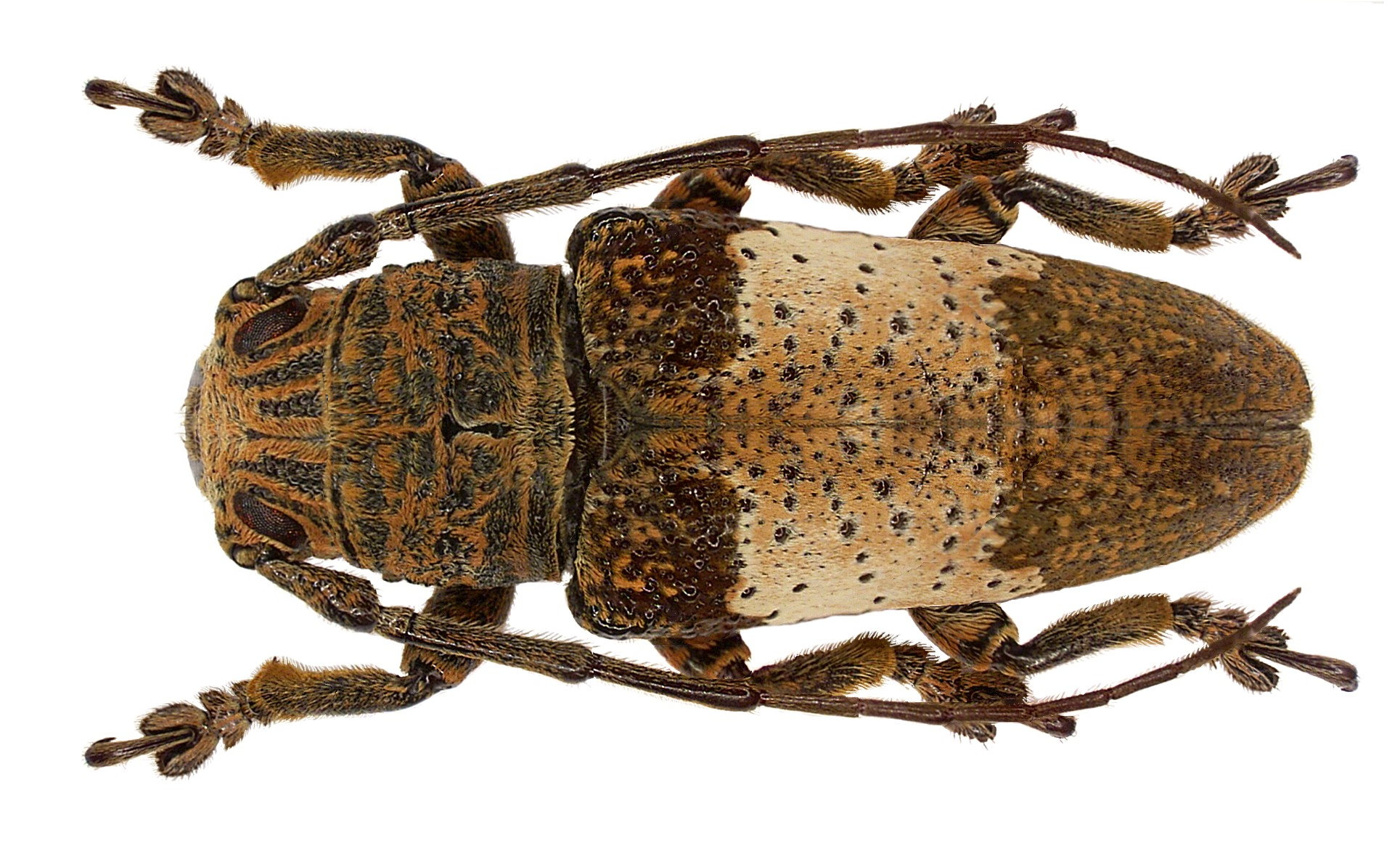 Familie: Cerambycidae Groesse: 25 mm Fundort: Indonesien, Irian Jaya, Manokwari-Prov., Ransiki leg. A.Skale, 2007; det. A.Weigel, 2007 Foto: U.Schmidt, 2007